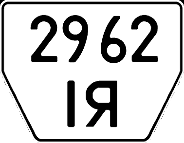 Номерной знак для прицепов Украины, стандарт 1992 года